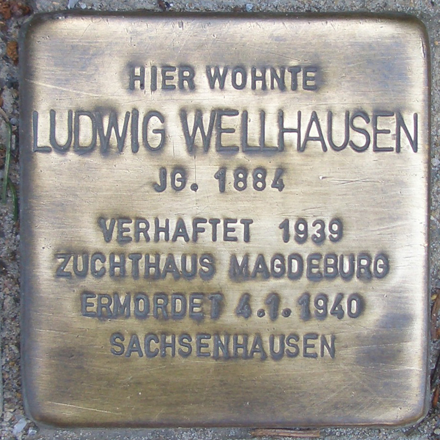 Stolperstein für Ludwig Wellhausen vor dem Gebäude Olendörp 33 in Hamburg-Fuhlsbüttel.